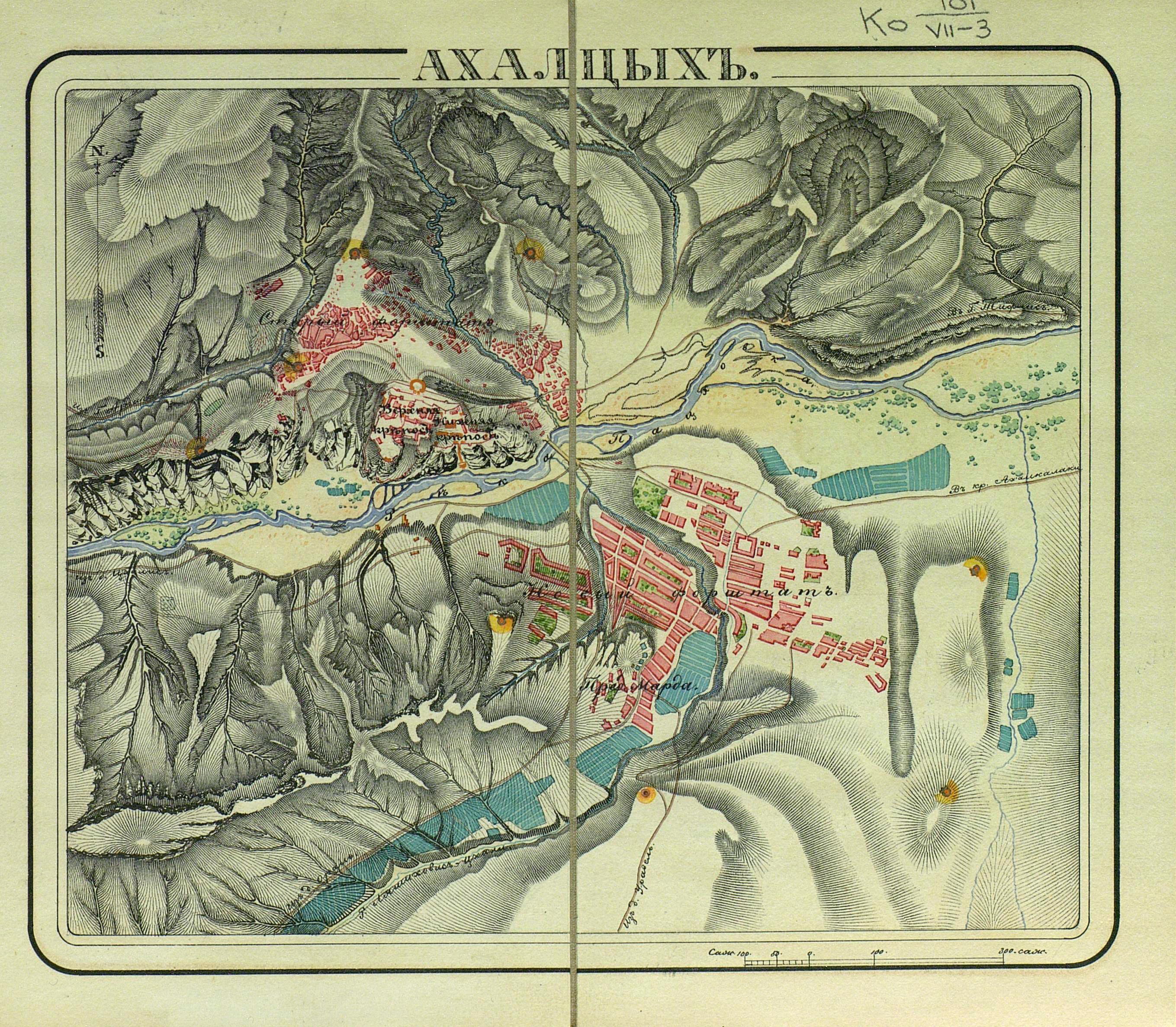 из "Атласа крепостей Российской империи"